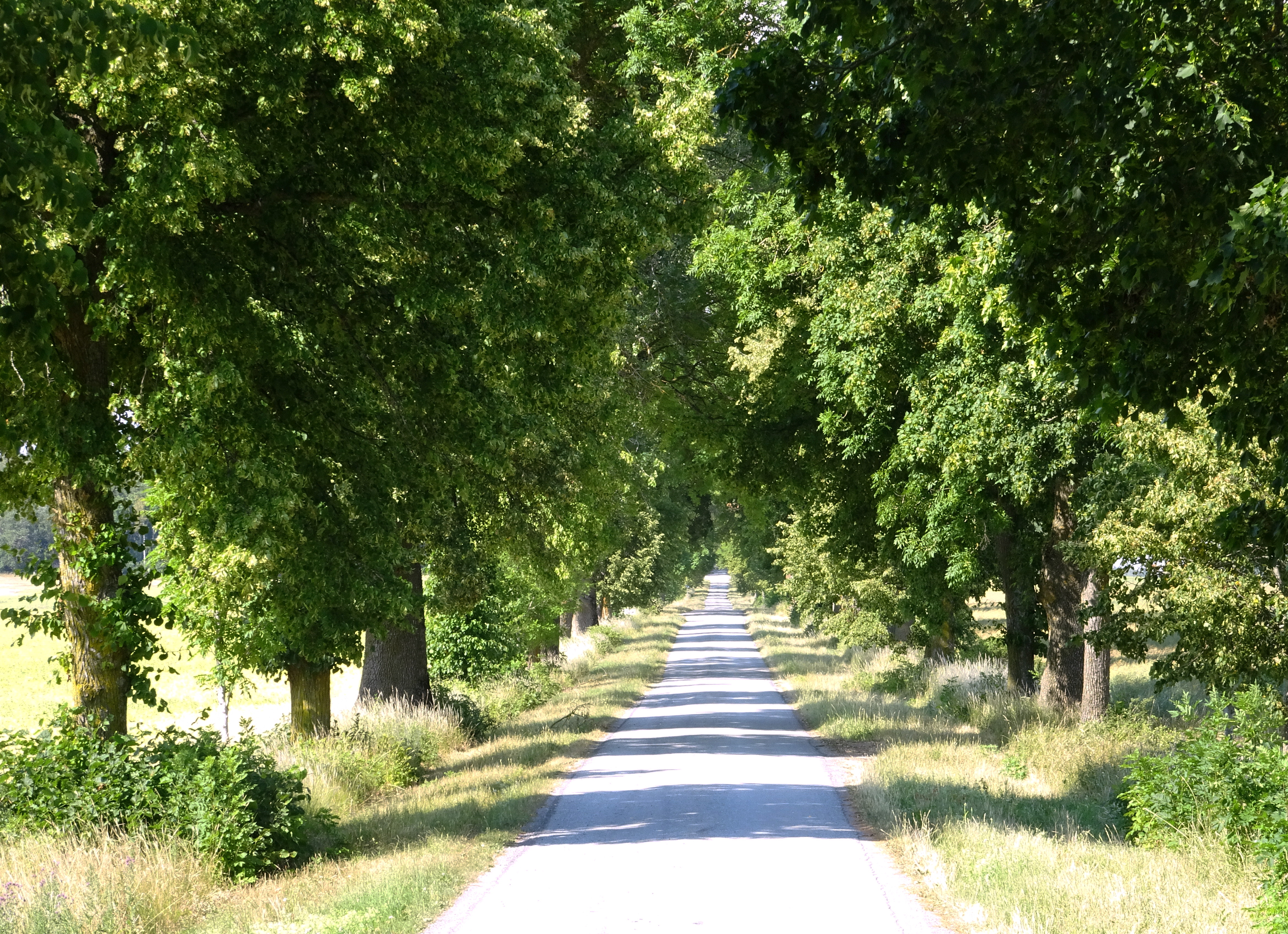 Hjulsta säteri, all+e mot norr